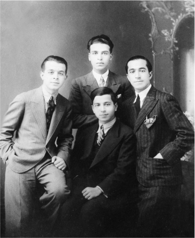 Debout de gauche à droite: Abdelkrim Hajji, Abdelhadi Zniber, Abdelmajid Hajji. Assis au milieu: Saïd Hajji. Photo prise à Damas en 1934. Abdelhadi Zniber étant meilleur ami de Said Hajji fondateur de la Presse Arabe au Maroc.